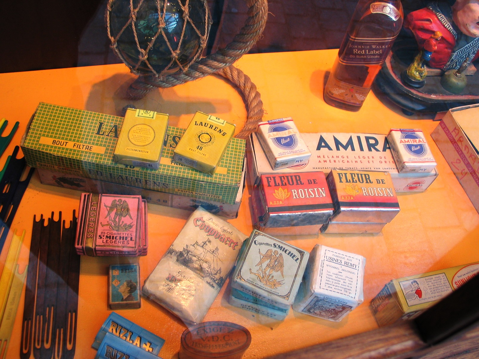 Voorraad aan boord - eigen foto Tabak en whisky aan boord van de O.129 Amandine (9 jan 2005)